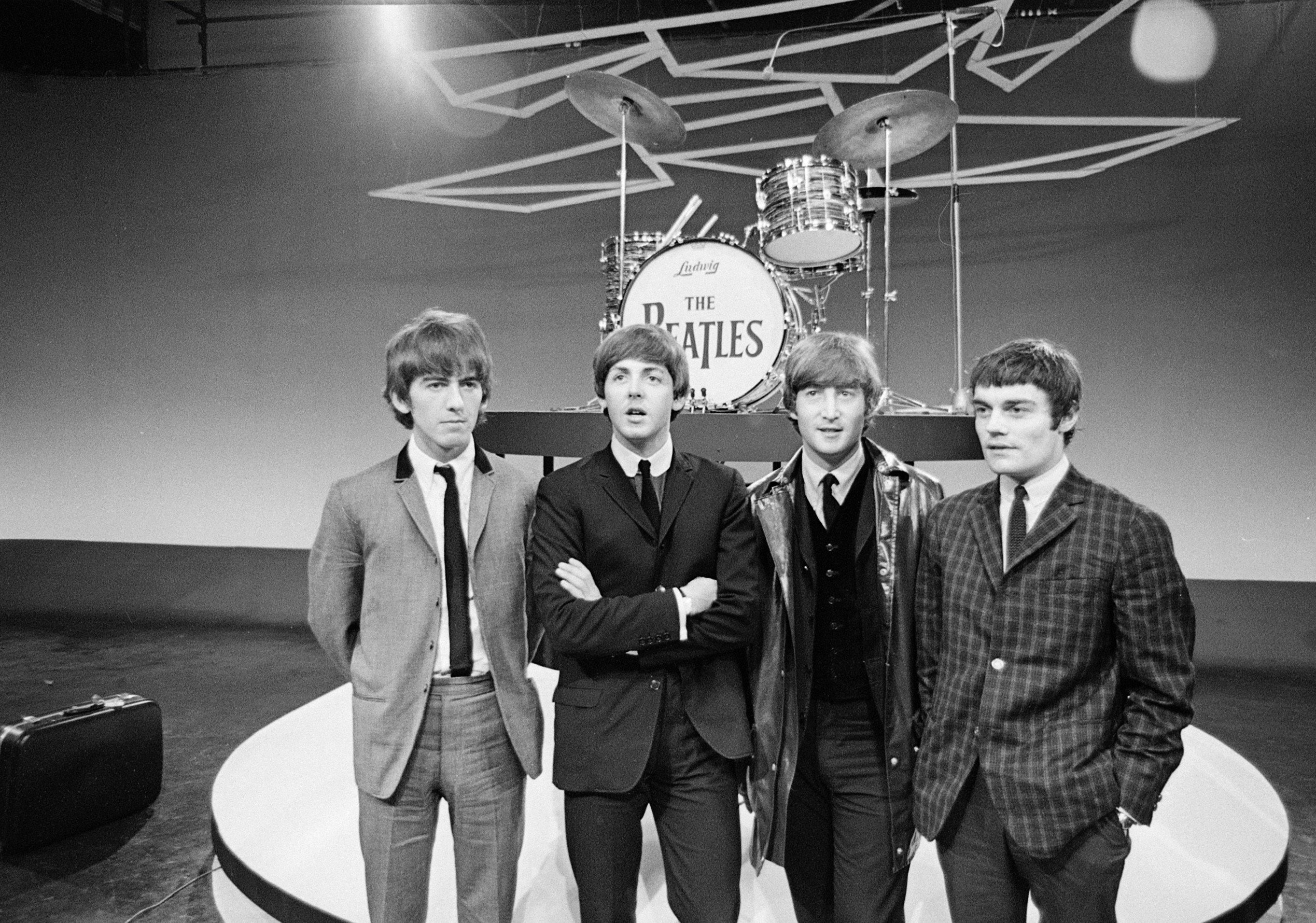 CollectieCollectie Fotoburo de BoerBeschrijvingThe Beatles in Treslong.FotonummerNL-HlmNHA_1478_2587K_12DocumenttypeHistorieprenten, tekeningen en foto'sVervaardigerBoer, Poppe de LandNederland ProvincieZuid-Holland GemeenteHillegom PlaatsHillegom Begindatum05-06-1964Einddatum05-06-1964Datering gebeurtenis05-06-1964TechniekFoto TrefwoordenBeatles